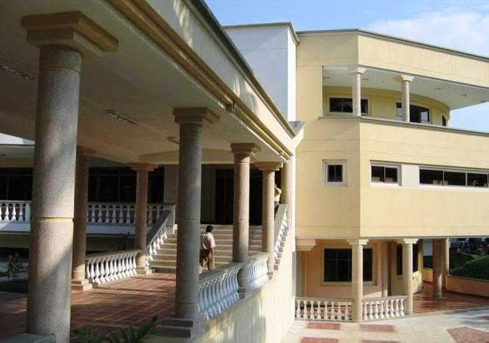 Universidad de la Amazonía - Sede principal en Florencia, Caquetá, Colombia